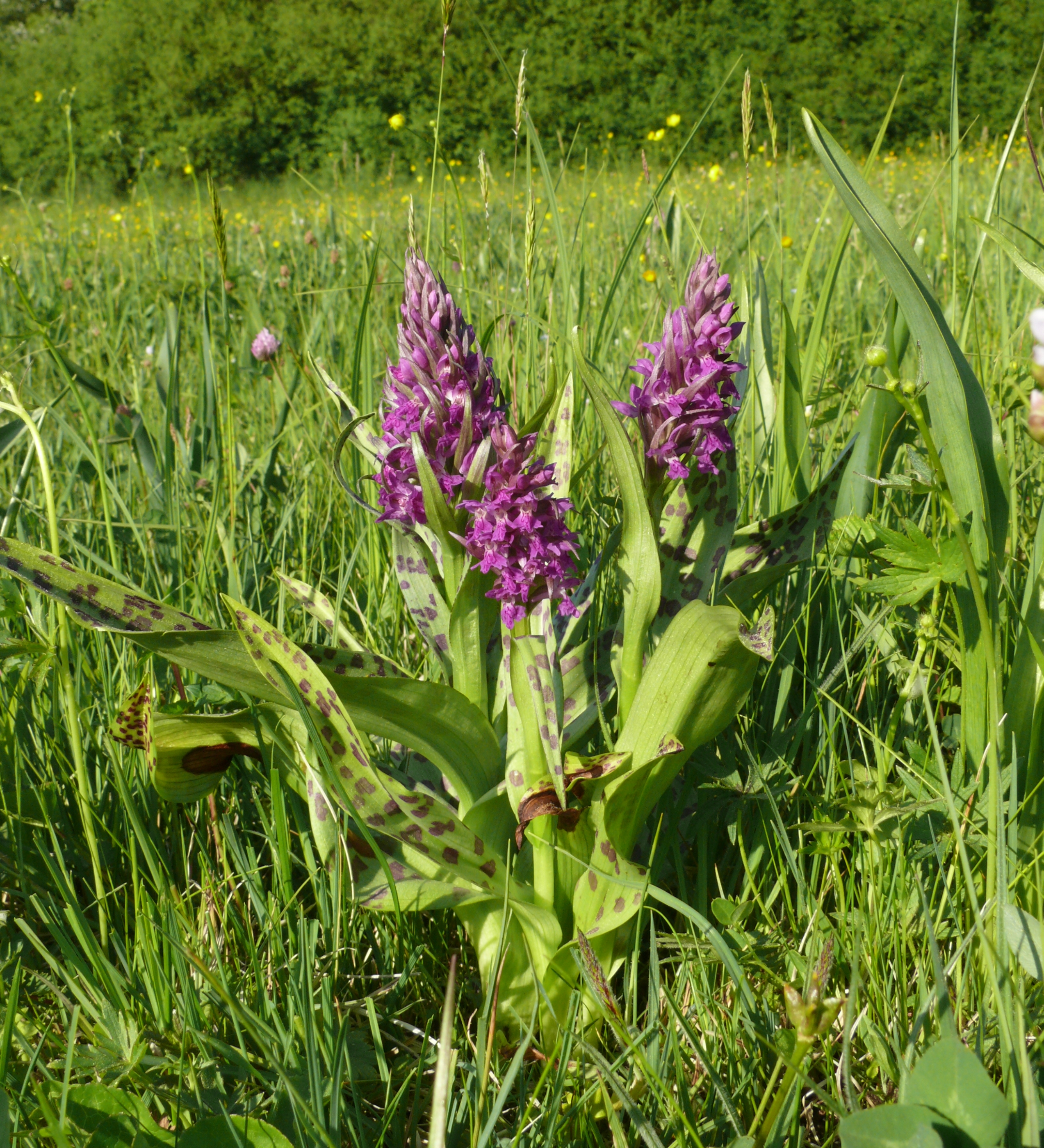 Dactylorhiza majalis, Virngrund, Deutschland